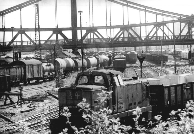 Halle, Güterbahnhof, Rangier-Lok ADN-ZB Lehmann 27.5.80 Halle: Als "Drehscheibe im Eisenbahnverkehr" wird der Güterbahnhof Halle bezeichnet, der neben dem in Dresden-Friedrichstadt der bedeutendste Güterumschlagplatz im Eisenbahnverkehr der DDR ist. Von hier werden täglich rund 100 Güterwageneinheiten mit etwa 4.000 Wagen aufgelöst und rund 90 Züge neugebildet. Kohle aus den Tagebauen des Bezirkes und Erzeugnisse der Chemiegroßbetriebe Leuna, Buna, Wolfen und Bitterfeld werden von hier weitertransportiert. Täglich passieren weiterhin etwa 180 Durchgangszüge das Gelände. Blick zur Berliner Brücke (alt).